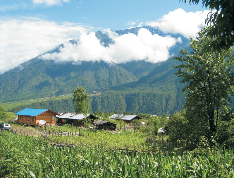 西藏林芝-下察隅